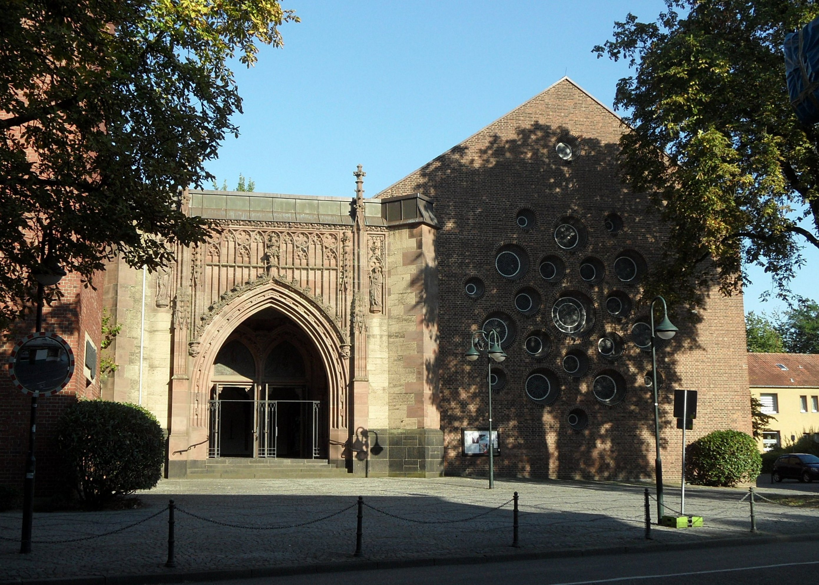 Wesel: Mariä Himmelfahrt-Kirche Westfassade, neugotisches Portal und Giebelseite Langhaus (in Baumschatten); September 2018